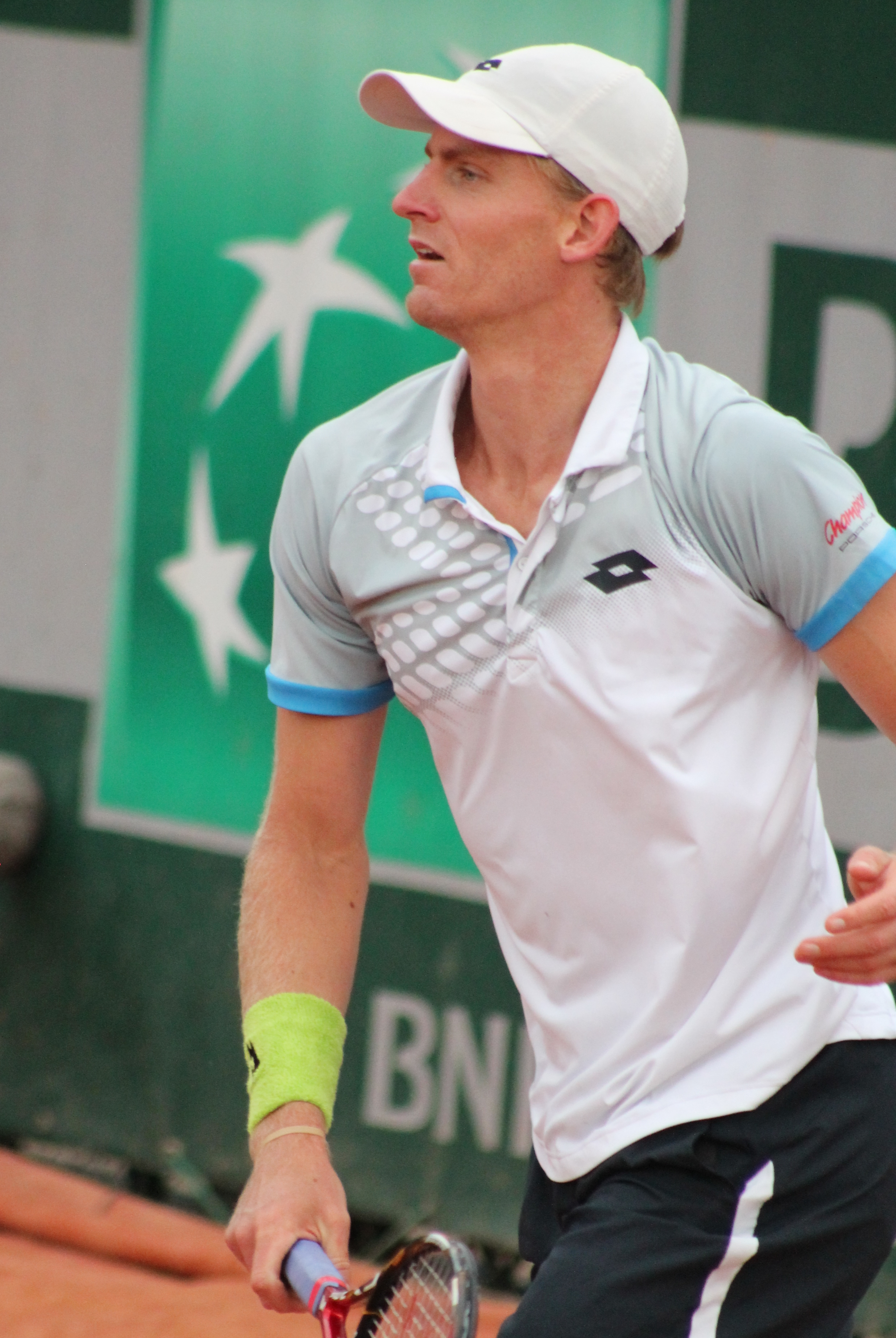 Anderson RG15 (20)